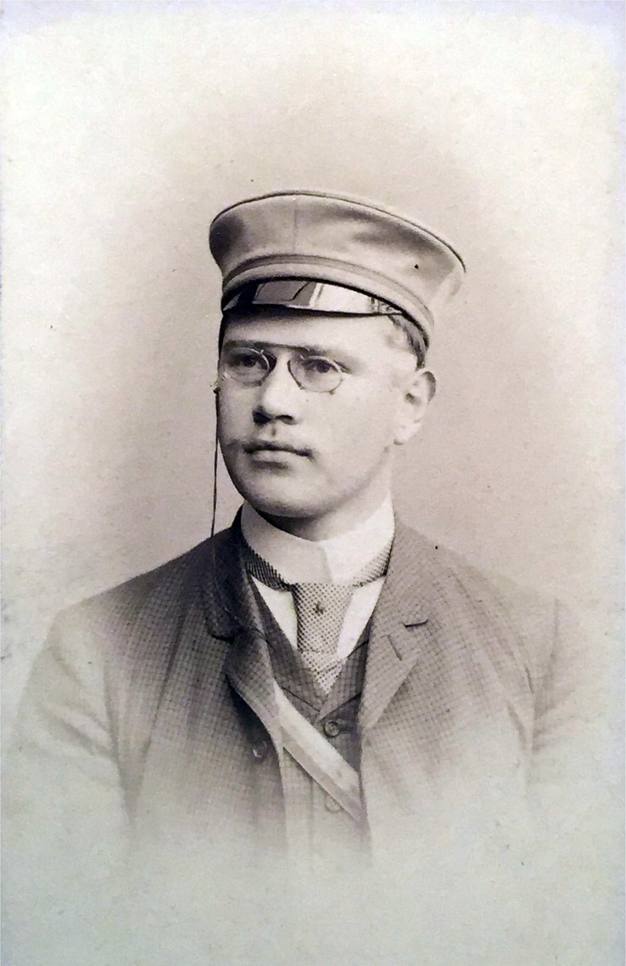 Porträtfotografie von Ferdinand Kretzschmar als Leipziger Corpsstudent